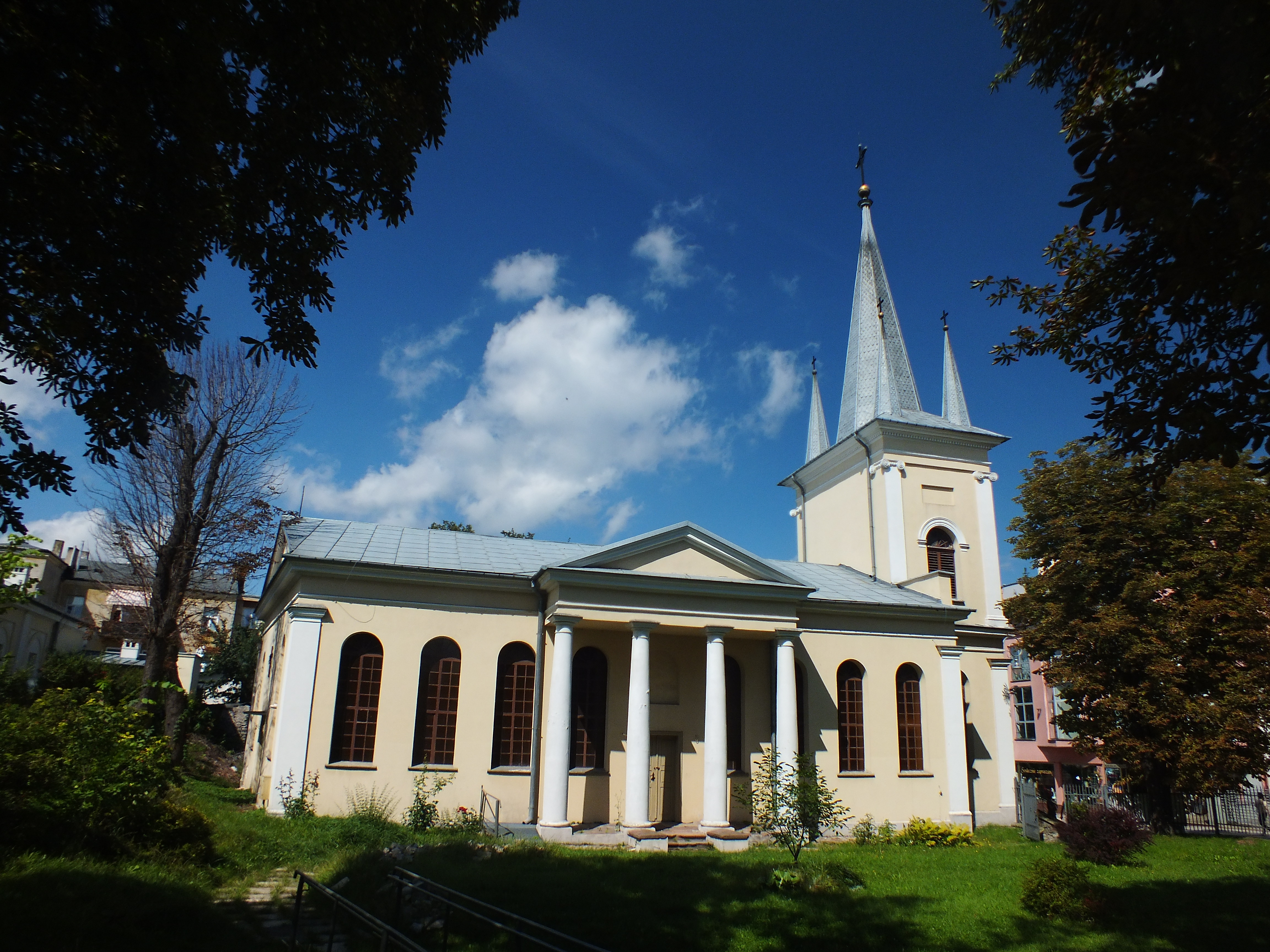 Kielce, kościół ewangelicko-augsburski pw. Świętej Trójcy, lata 1835-1837